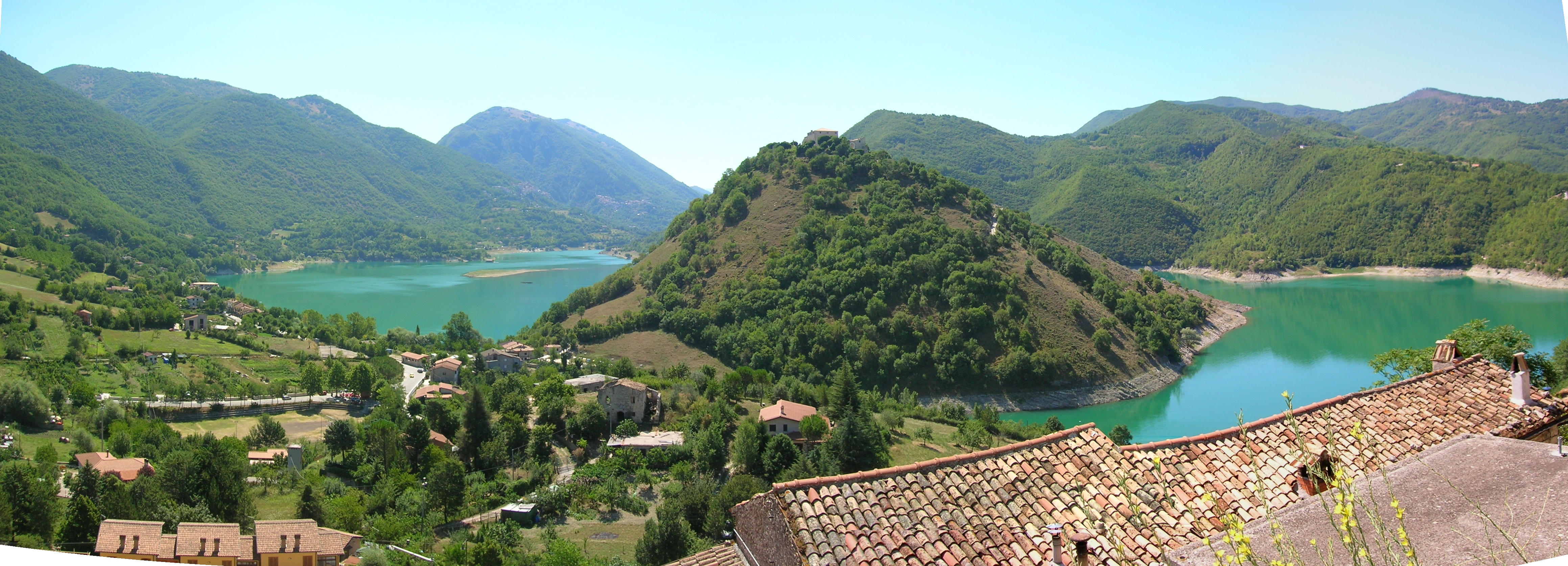 Panorama da Castel di Tora, credo Monte Antuni, Borgo Antuni